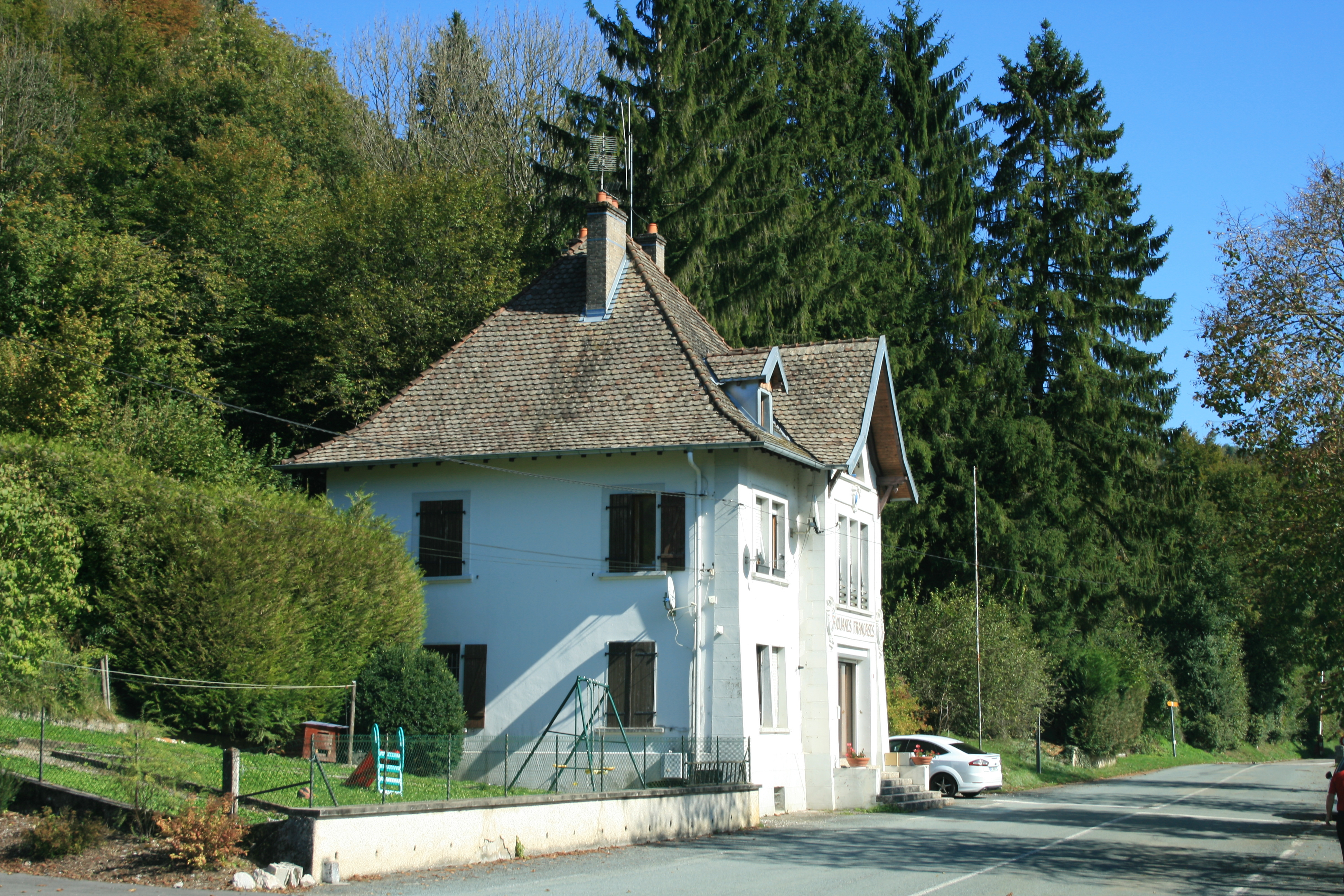 Französische Grenzstation am Doubs an der Grenze zur Schweiz